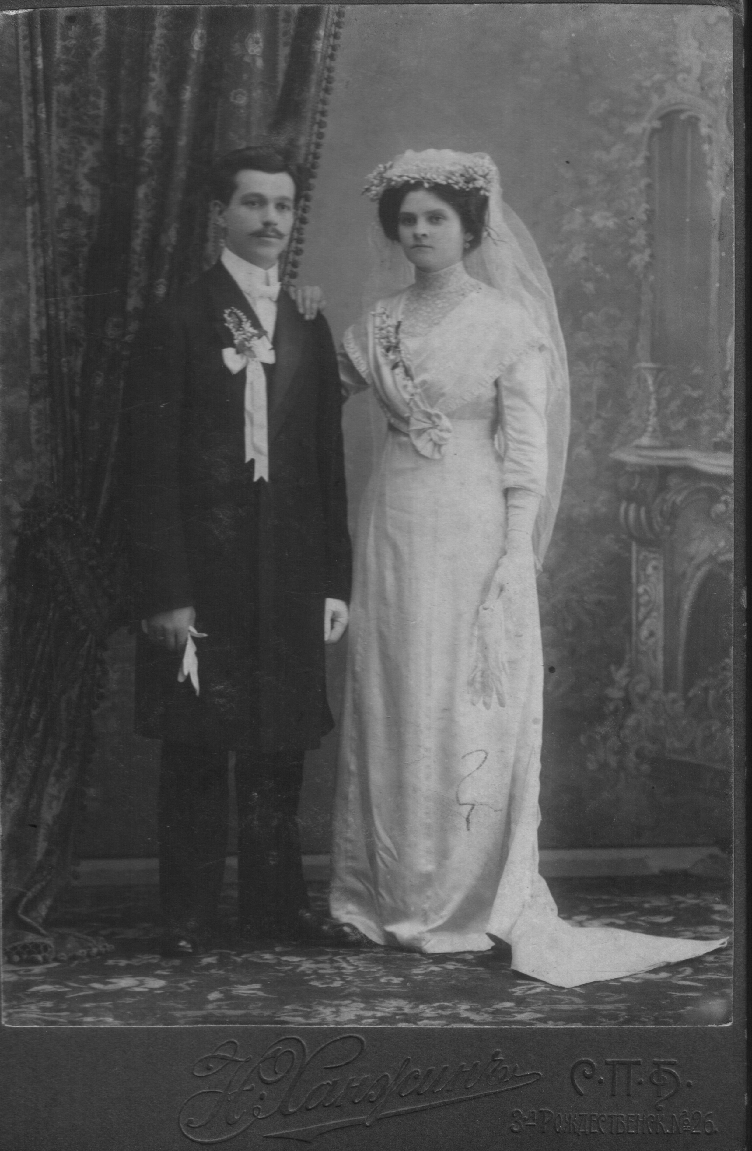 Шлюбнае фота Ядвігіна Ш.